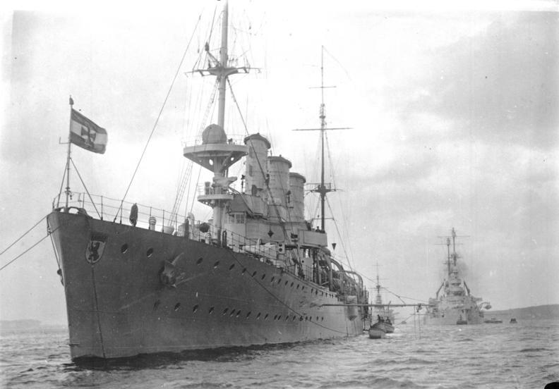 Der deutsche Kreuzer "Berlin" ausser Dienst gestellt! Der deutsche Kreuzer "Berlin" im Hafen von Kiel, welcher ausser Dienst gestellt wurde, dahinter das deutsche Linienschiff "Hessen"